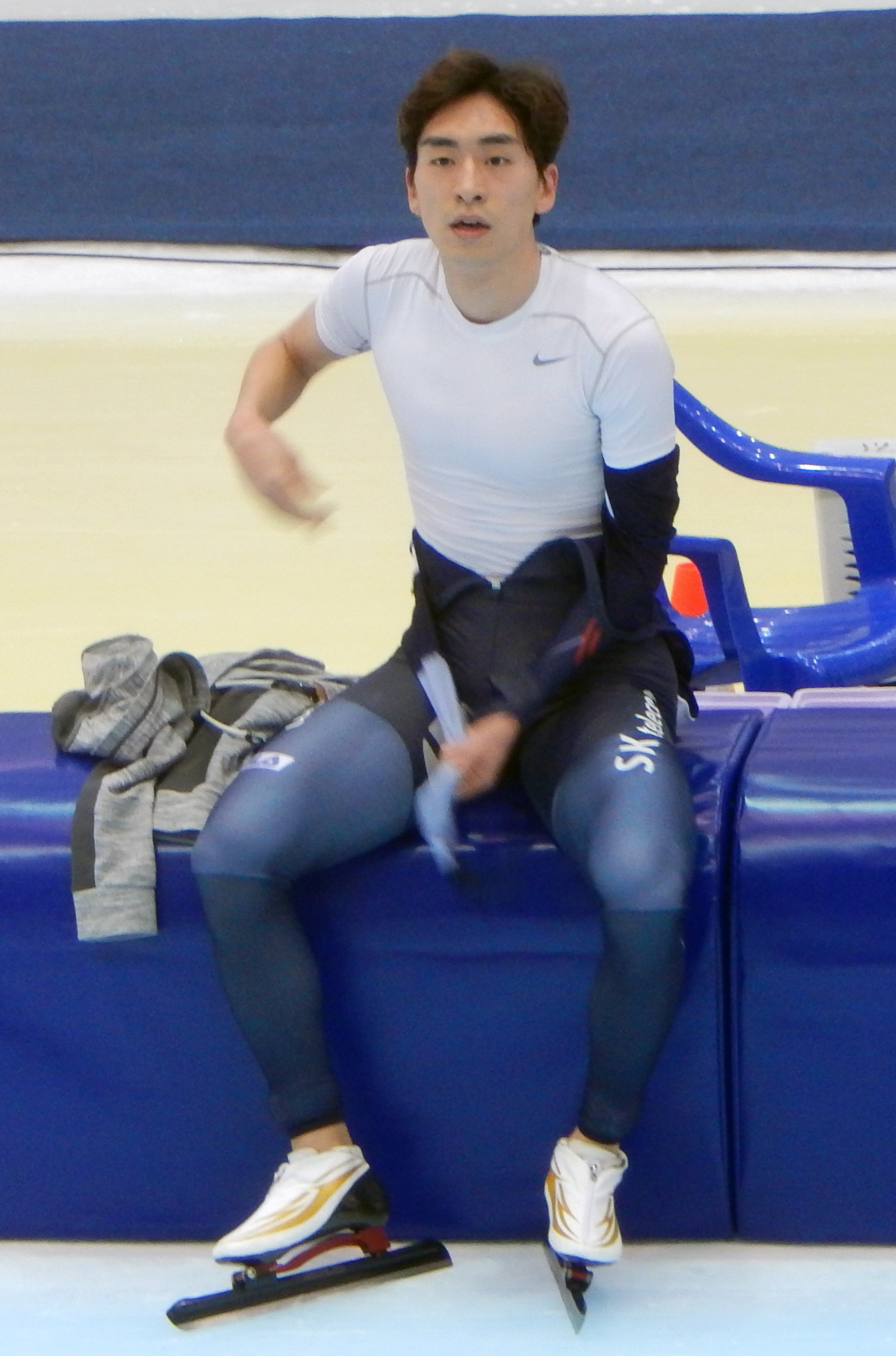 Чемпионат мира по конькобежному спорту 2016 в Коломне. Ли Сын Хун после окончания забега на 10000 метров у мужчин.